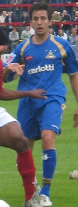 Brian Stock.